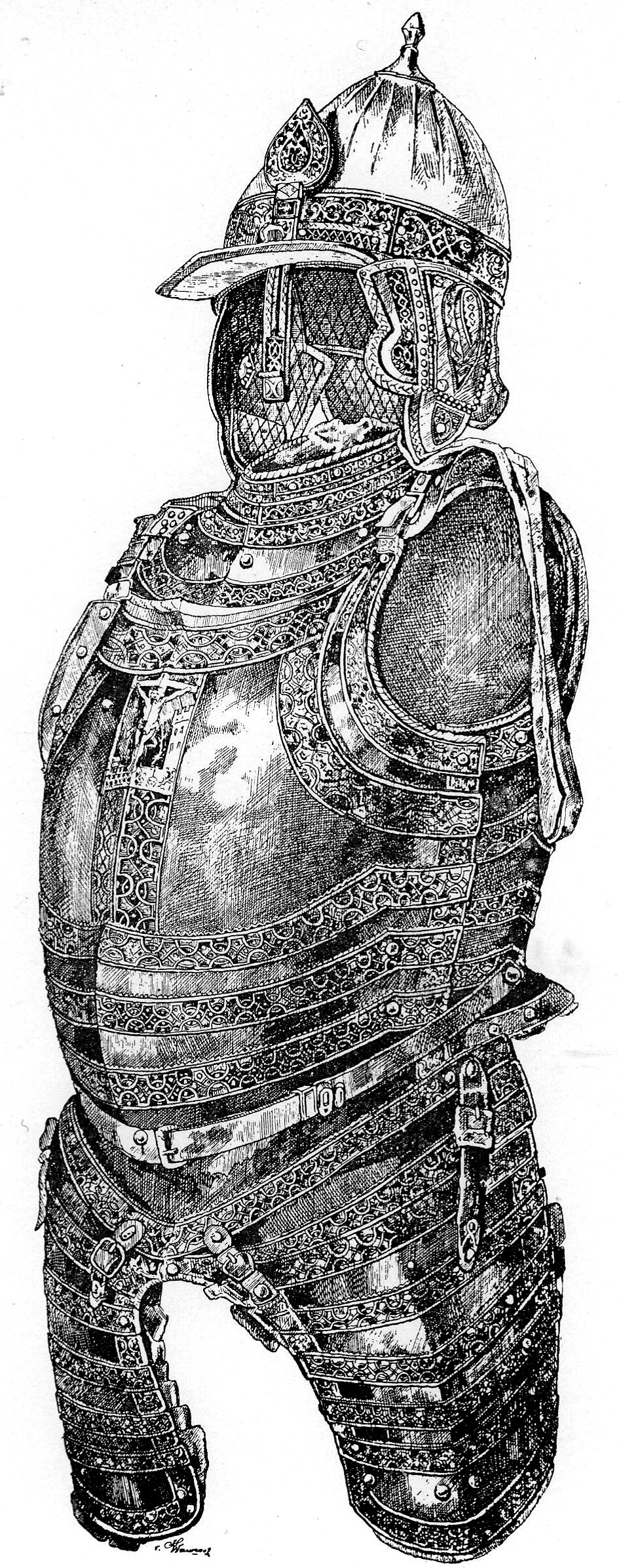 półzbrojek bogaty polski